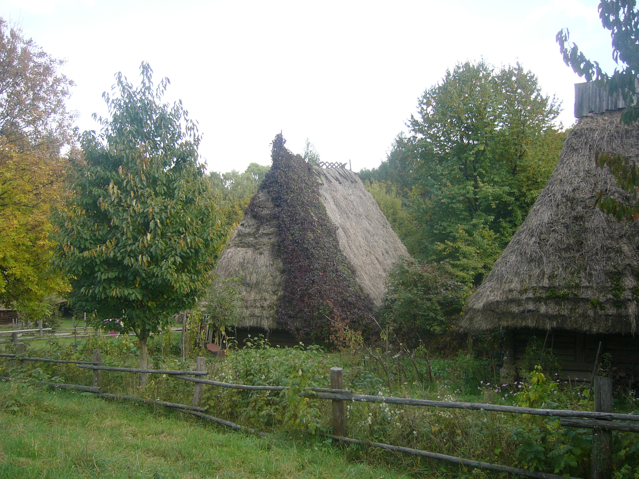 ШевченківськийГай3.jpg: львівський скансен "шевченківський гай"